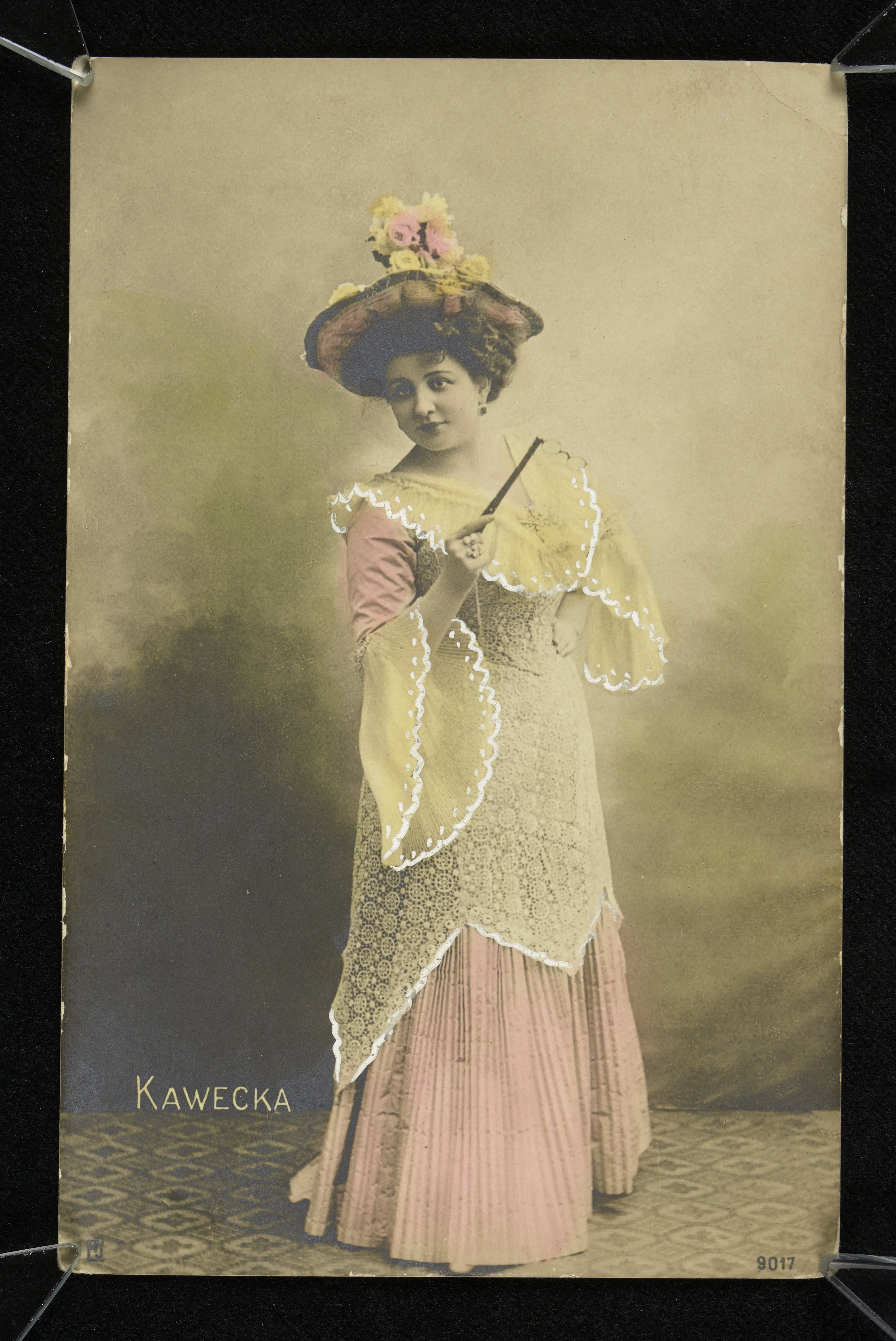 Wiktoria Kawecka, pocztówka z 1905 r.